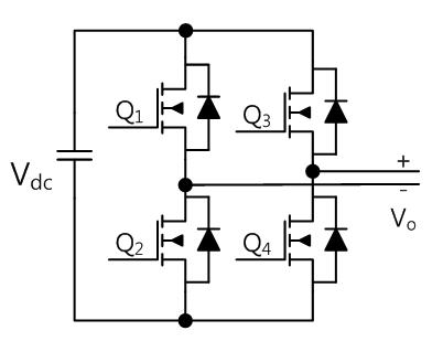 傳統全橋式逆變器